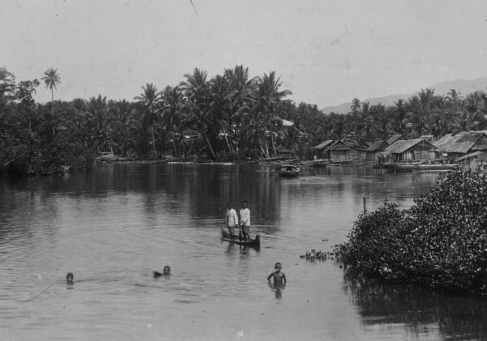 Foto. Zwemmende kinderen bij Laboeha op Batjan